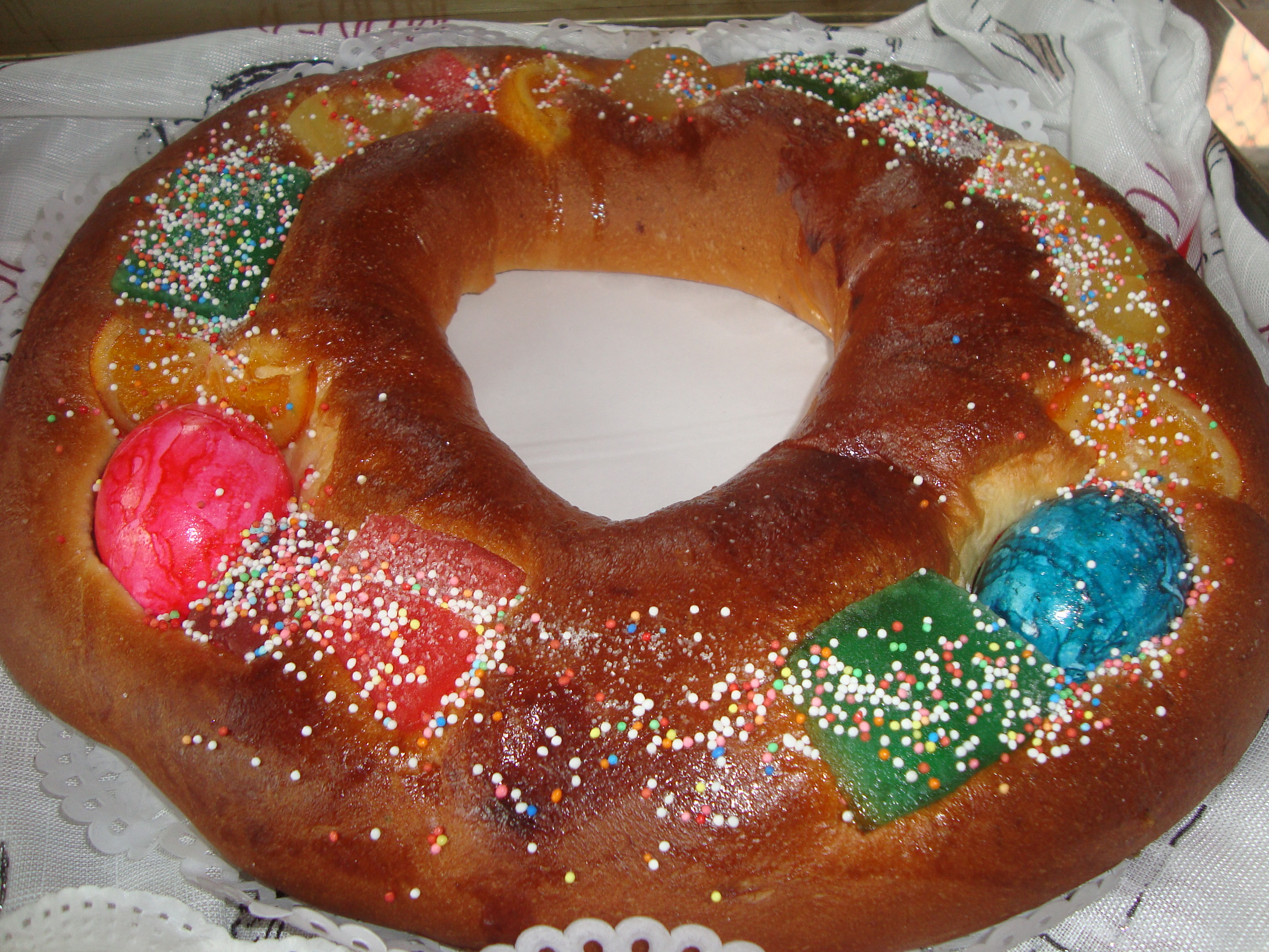 Mona de Pascua de dos huevos (Comunidad Valenciana)